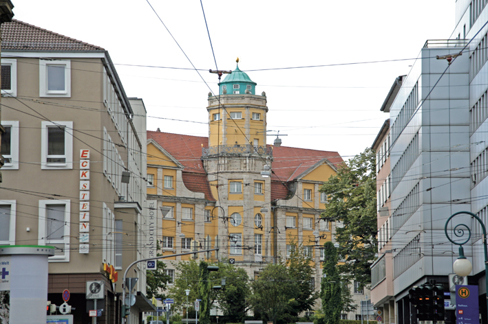 Landesmuseum Kassel